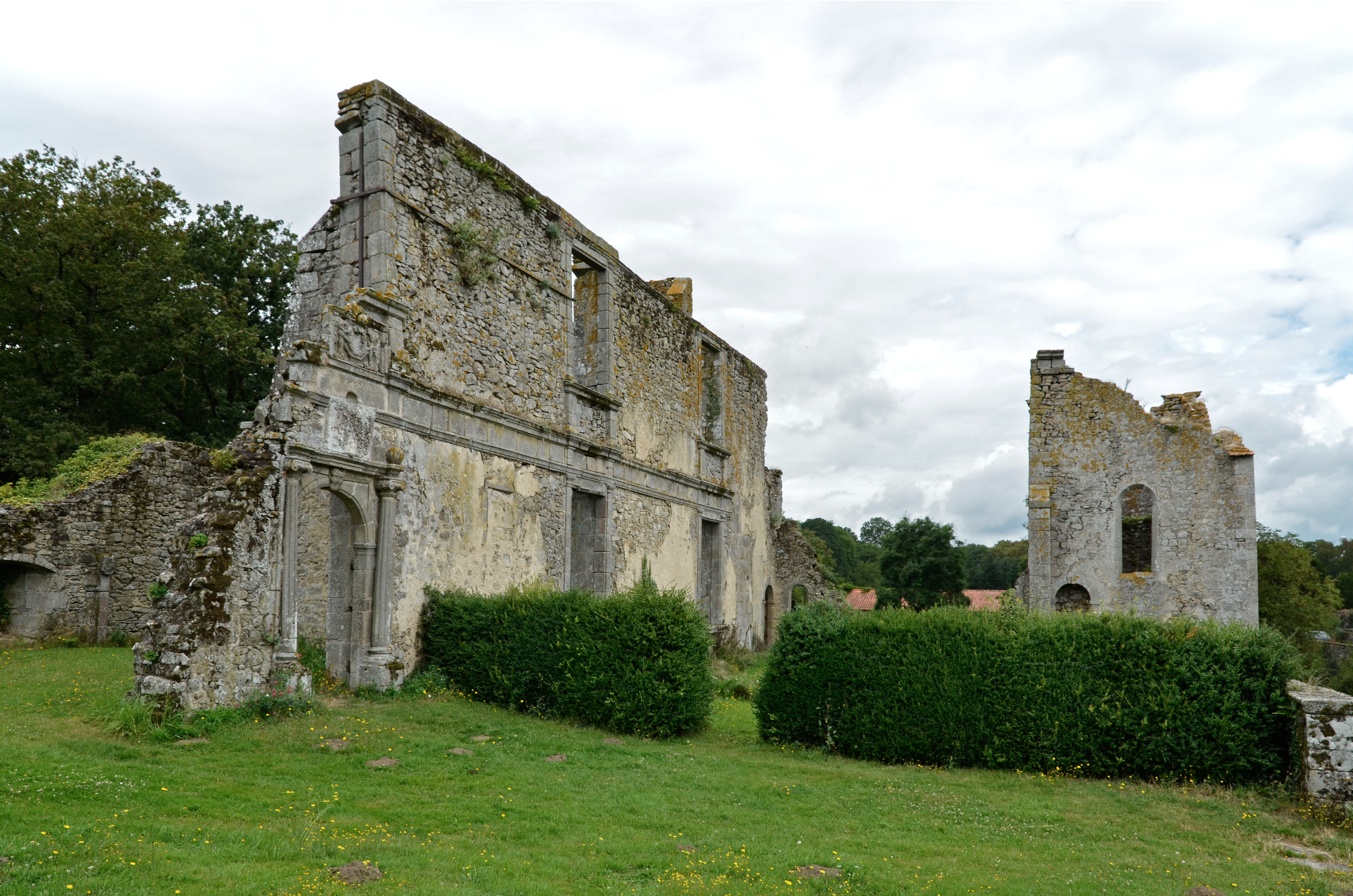 Propriété de la Durbelière, à Saint-Aubin-de-Baubigné - Mauléon, Deux-Sèvres .